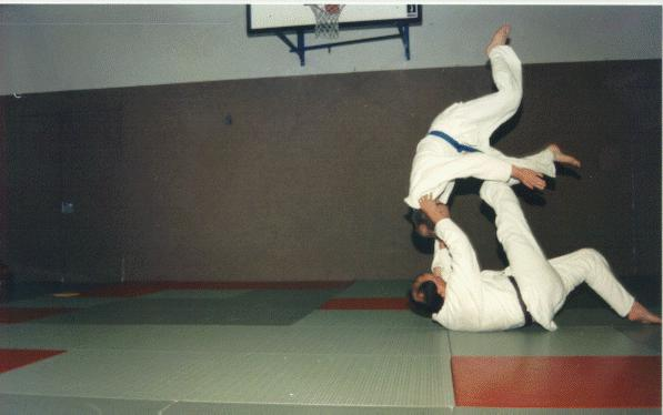 Picture shows a dynamic soto-maki-komi